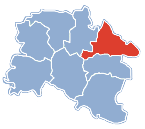 Położenie gminy Sulmierzyce na mapie powiatu pajęczańskiego.